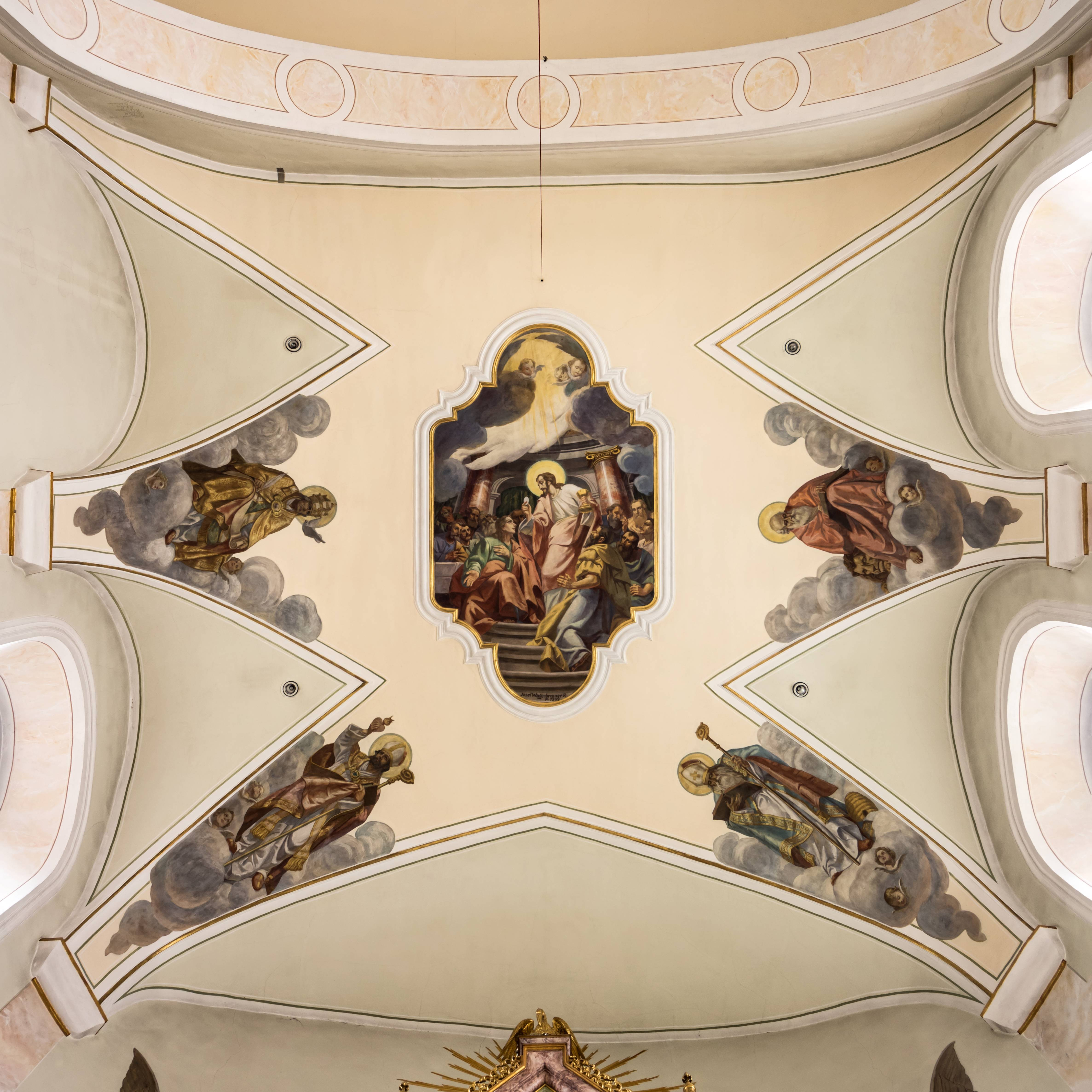 Bilder aus Jechtingen am Kaiuserstuhl Katholische Kirche Sankt Cosmas und Damian Die Chordecke mit der Apostelkommunion